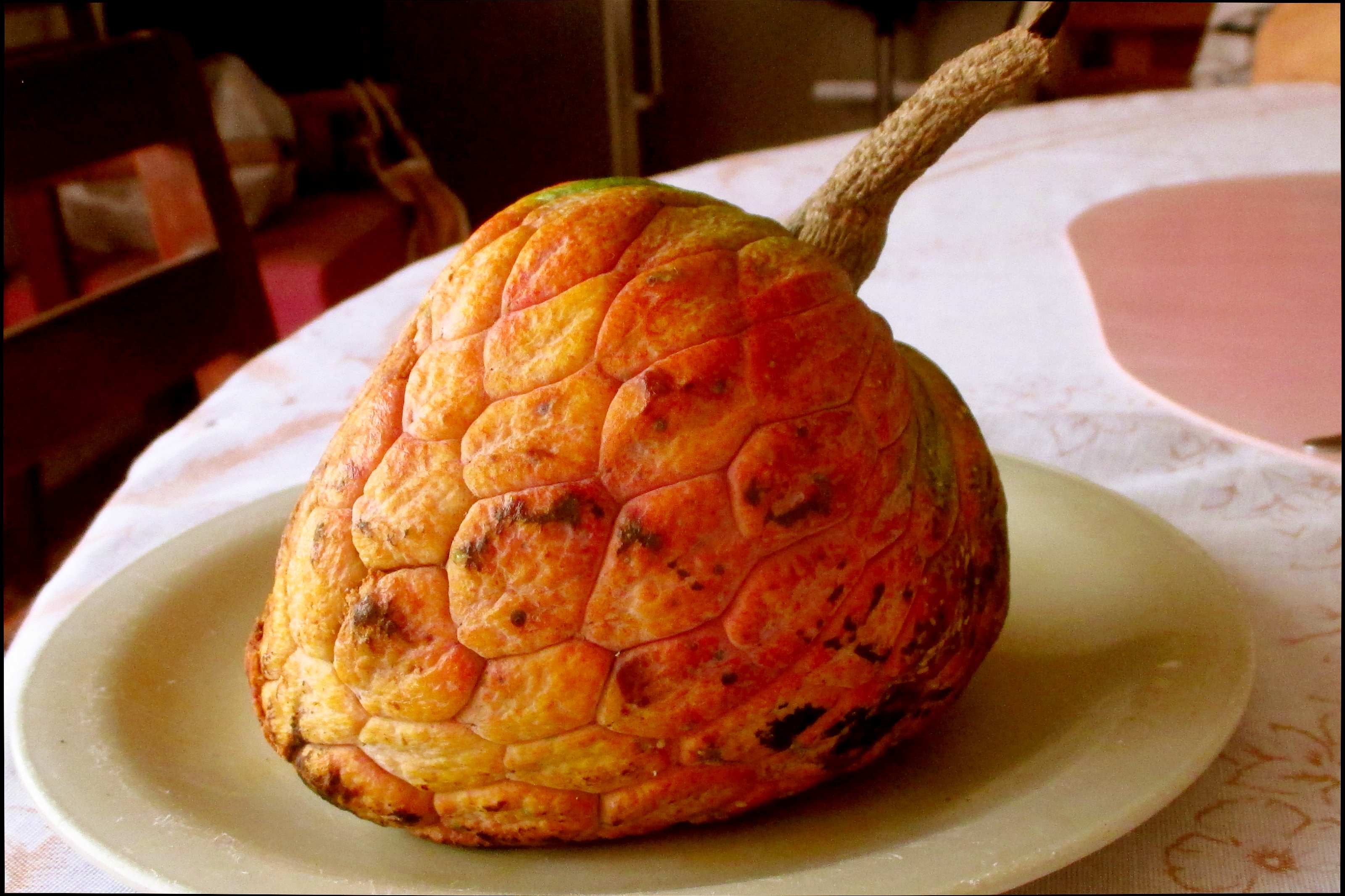 Ilama de Chilpancingo, Guerrero, méxico